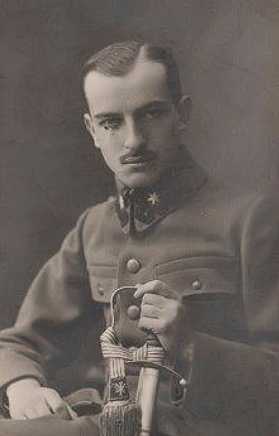 Zygmunt Karol Karwacki